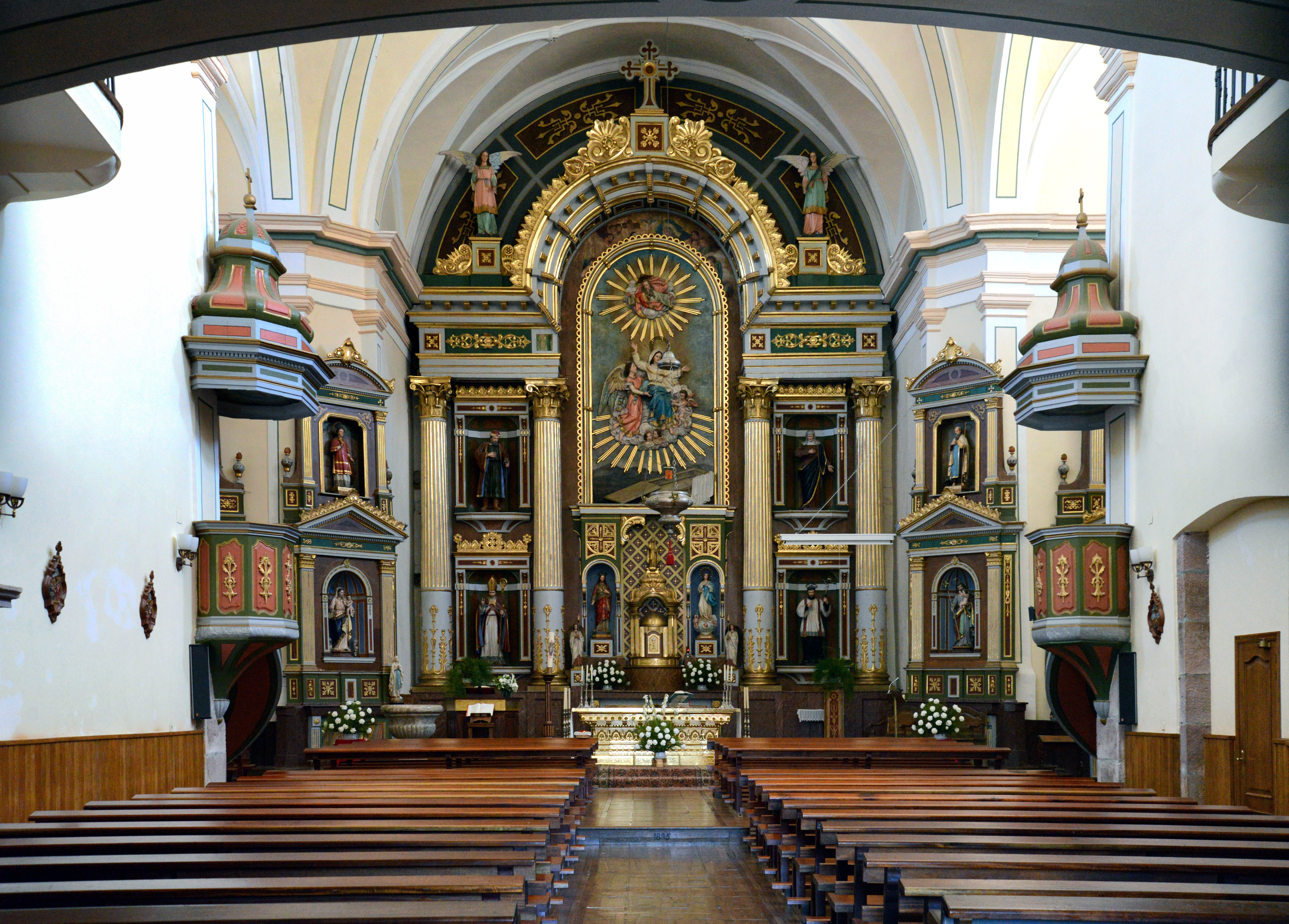 Zugarramurdi, Pays basque espagnol, Navarre (Espagne) - Intérieur de l'église de l'Assomption du XVIIIe siècle.